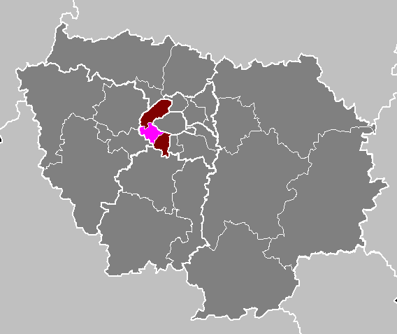 Maps of arrondissements and cantons of France: Département des Hauts-de-Seine - Arrondissement de Boulogne-Billancourt.PNG (Région Île-de-France)